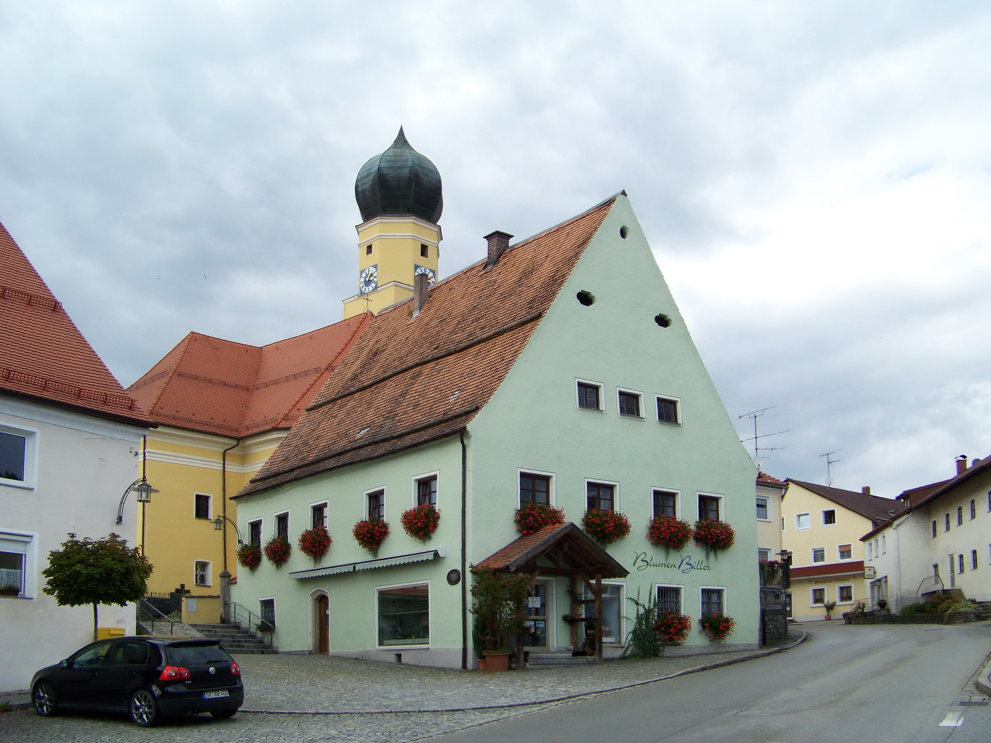 Schwarzach, Marktplatz 10. Ehemaliges Gerichtsschreiberhaus. Zweigeschossiger Steilgiebelbau mit steilem Satteldach, erbaut 1636.